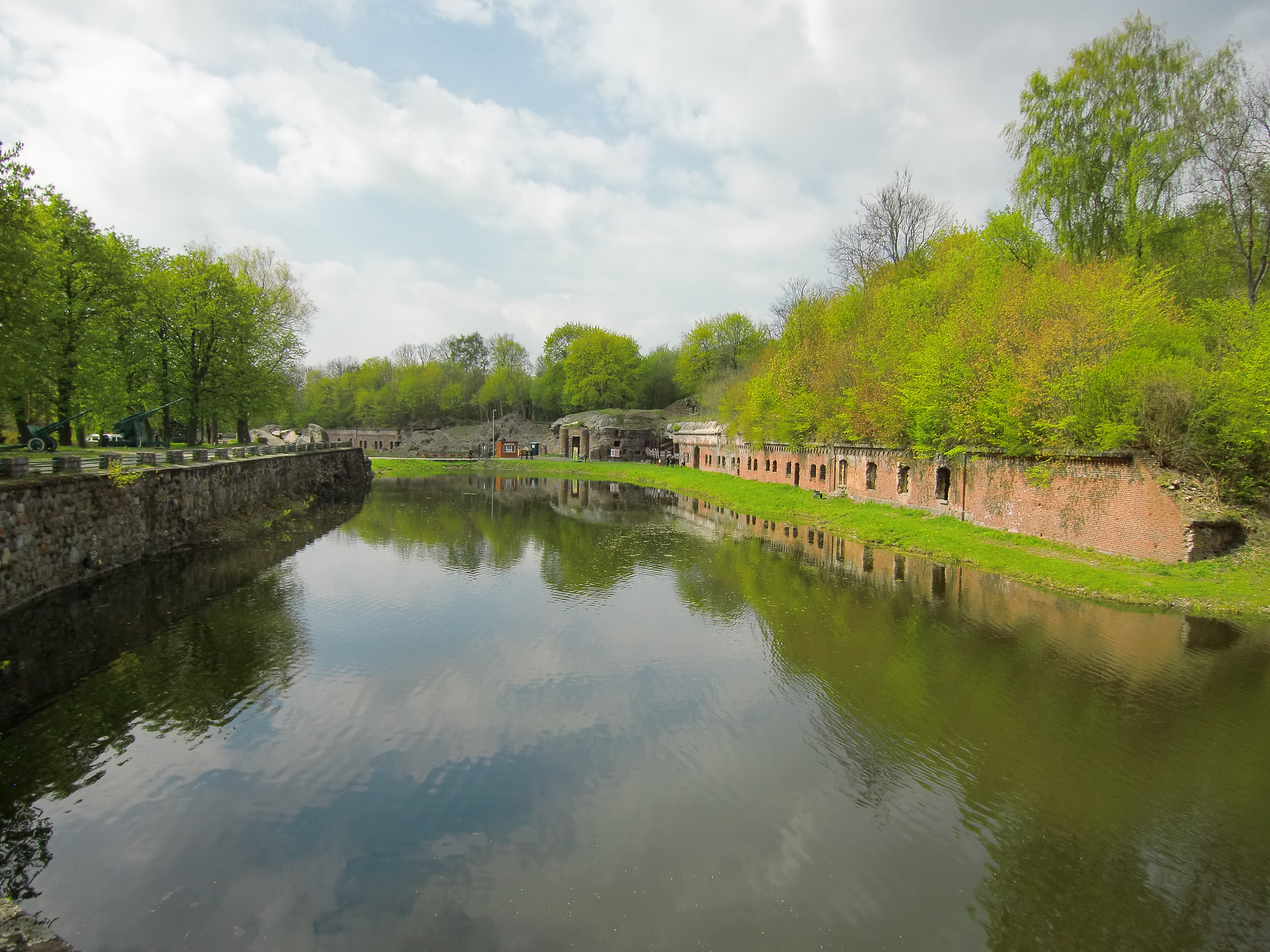 Форт № 5 с рвом и кирпичной стеной с амбразурами.